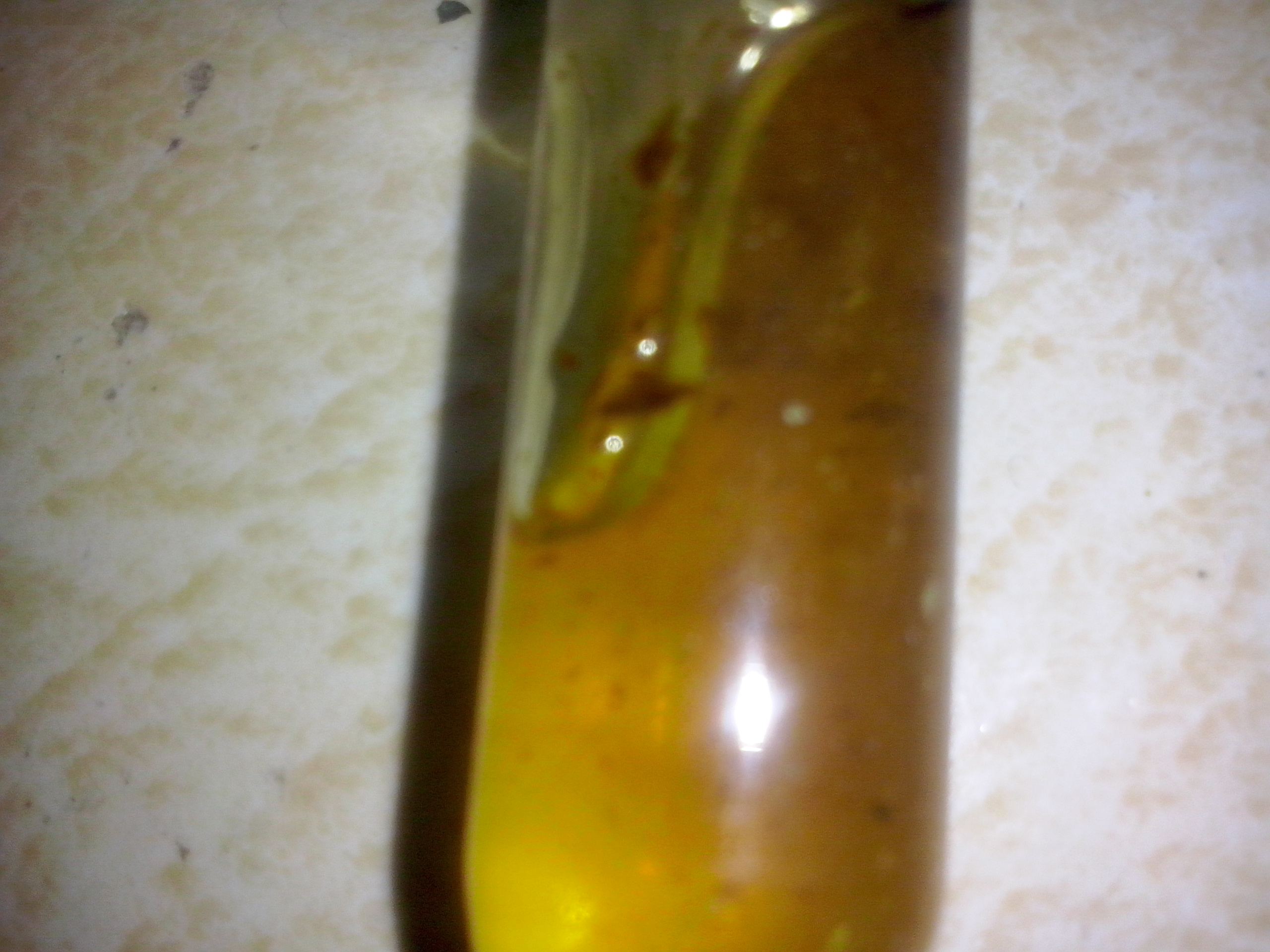 Silicato de Sodio entubado